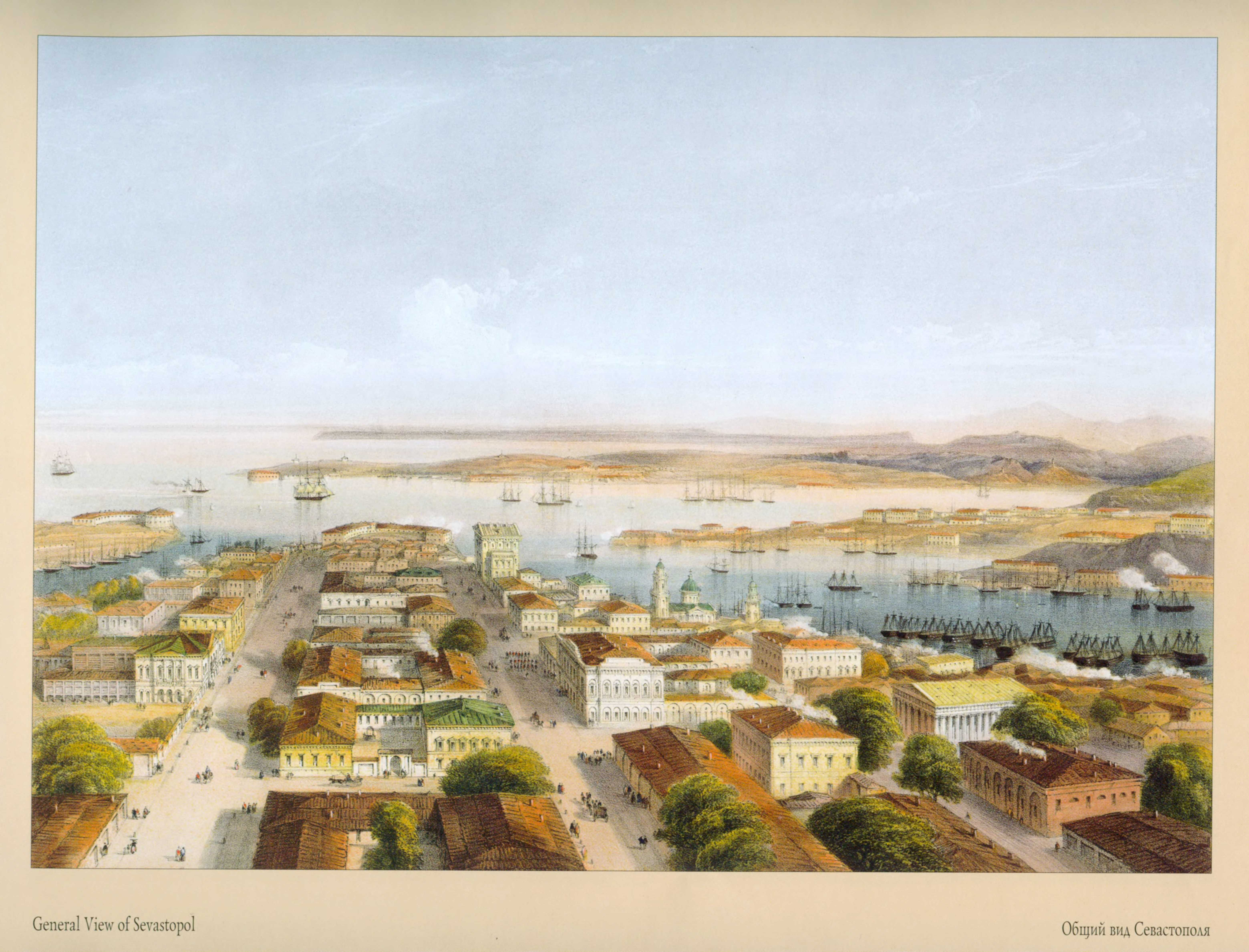 Карло Боссоли. Общий вид Севастополя